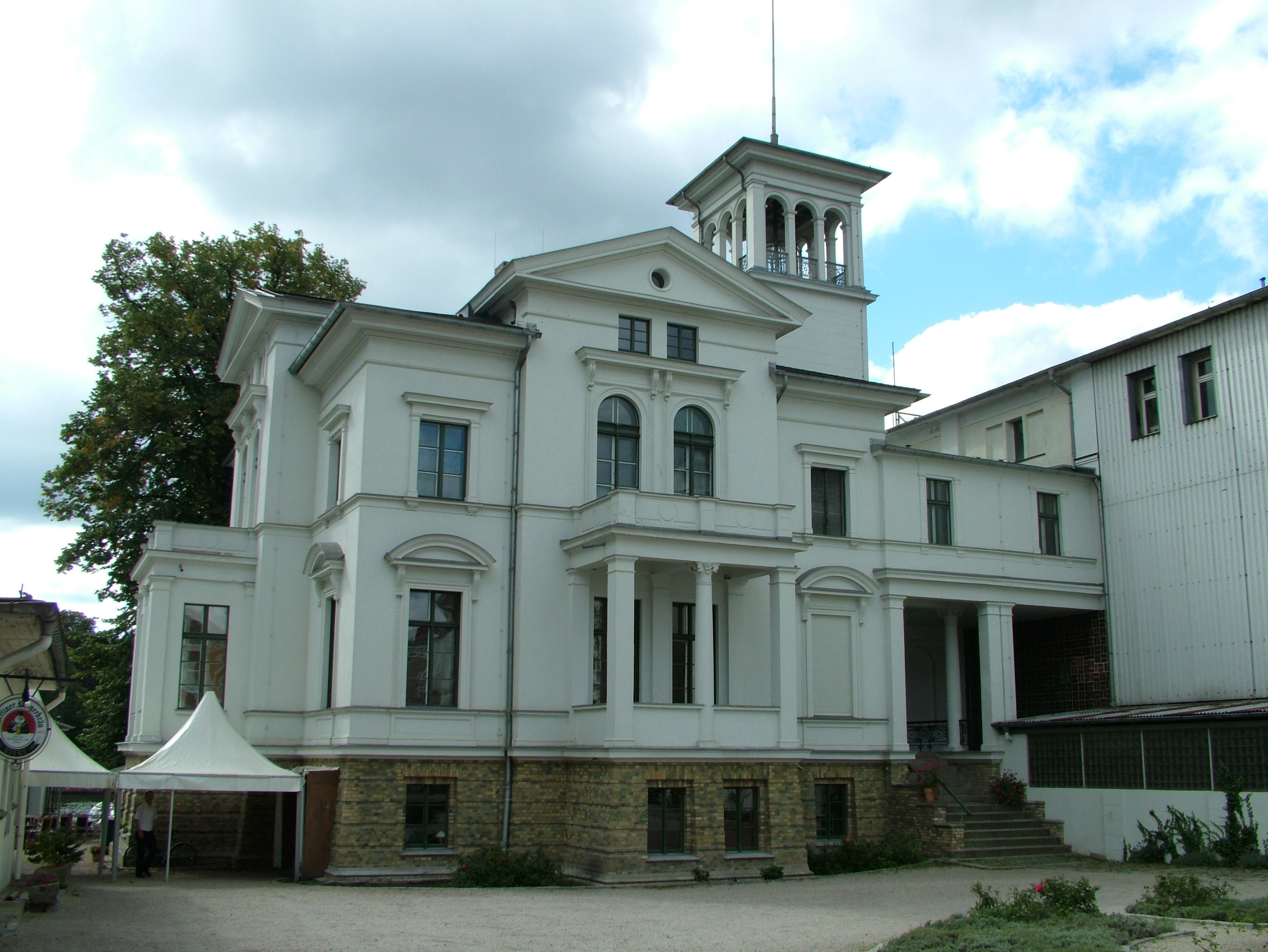 Berlin, Deutschland, Friedrichshagen, die Weiße Villa neben der Berliner Bürger Brauerei